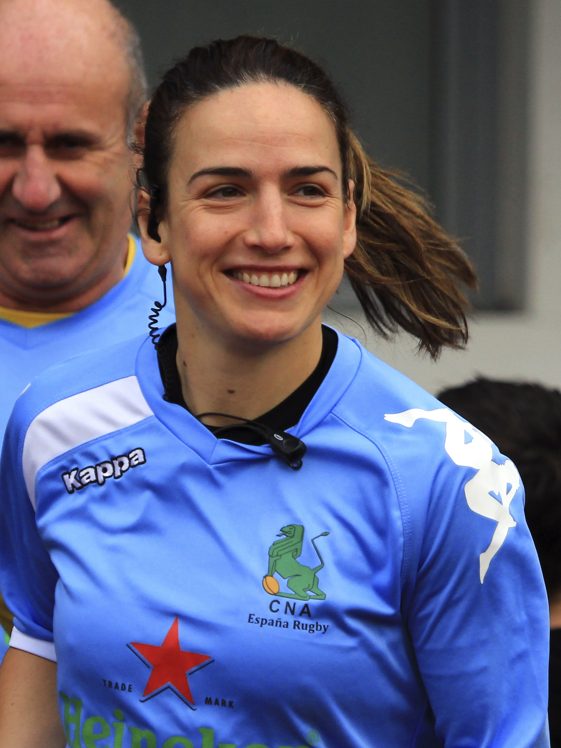 Alhambra Nievas momentos antes de dirigir el encuentro de D.H. entre Ordizia y SENOR Independiente en Ordizia, Diciembre de 2016.